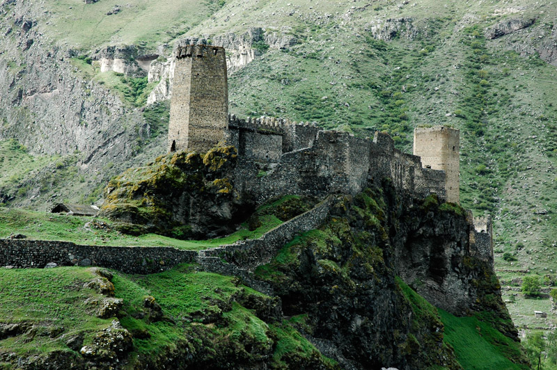 Kelyje link Akhaltsikheės. Giedrelio ir Laurio nuotrauka